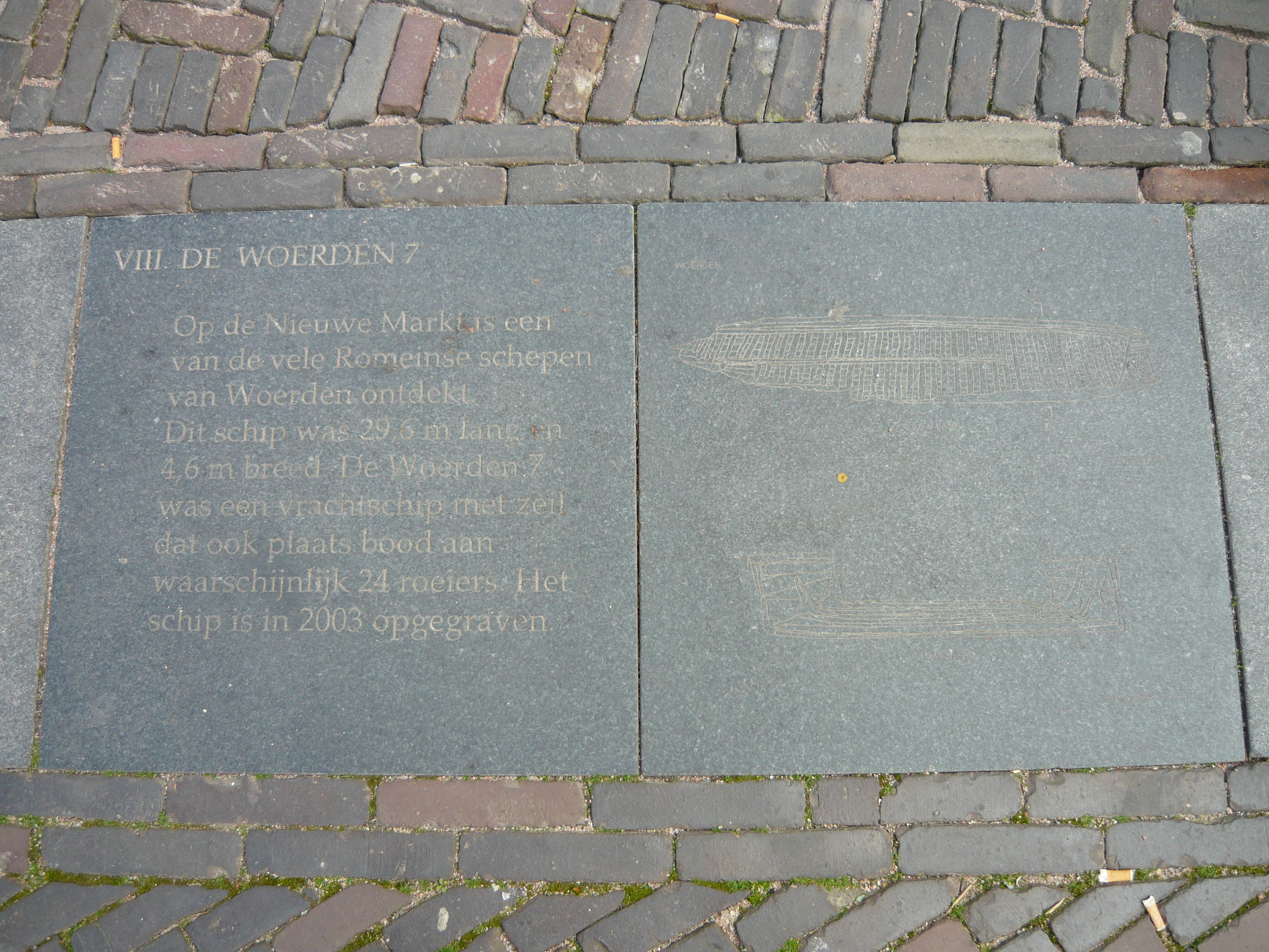 Plaquette omtrent het Romeinse schip "Woerden 7". Aangebracht bij het voormalige castellum Laurium te Woerden, vlakbij de vindplaats.